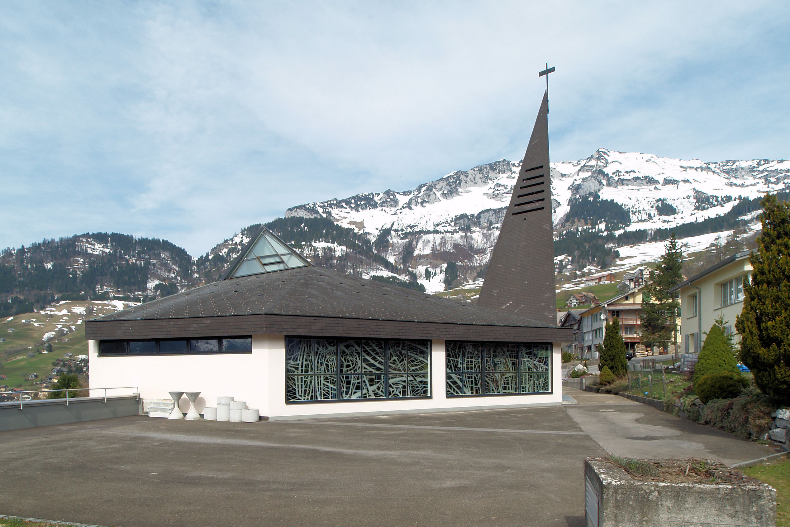 Die St. Anna-Kapelle in Amden. Dritte St. Anna-Kapelle Baujahr 1971.